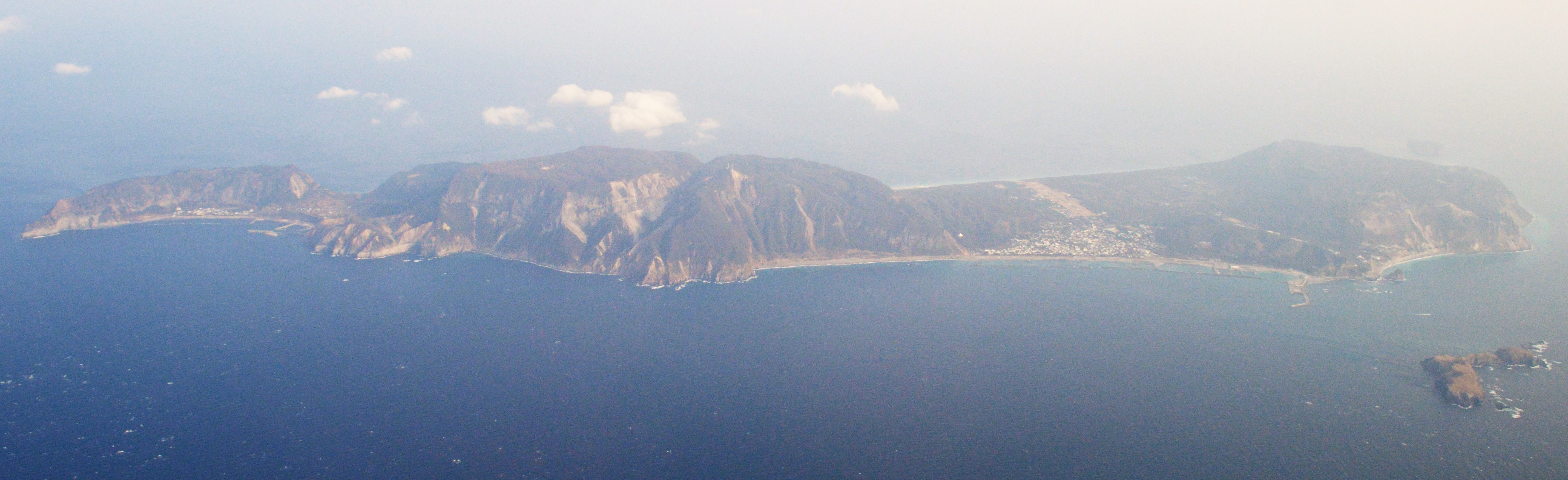 新島全景 (空撮)